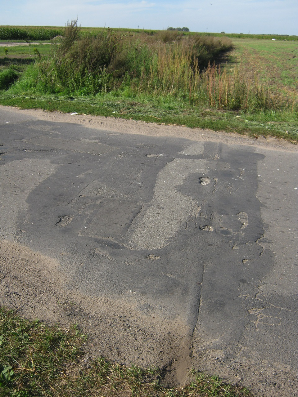 Resztki przejazdu kolejowego w Mierzewie w ciągu drogi Mierzewo- Jarząbkowo